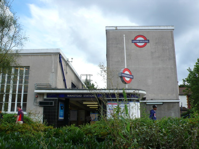 This station was designed by architect Charles Holden and although construction was started in 1930 it was not completed until 1947 due to the second world war.